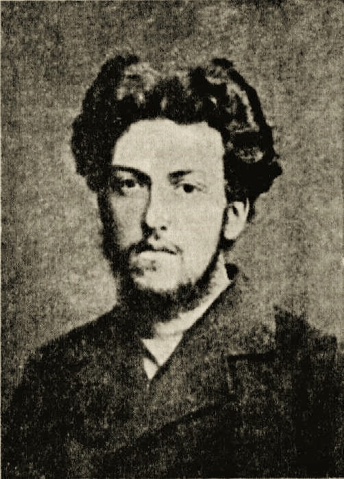 Aleksandr Evgrafovič Sentjanin